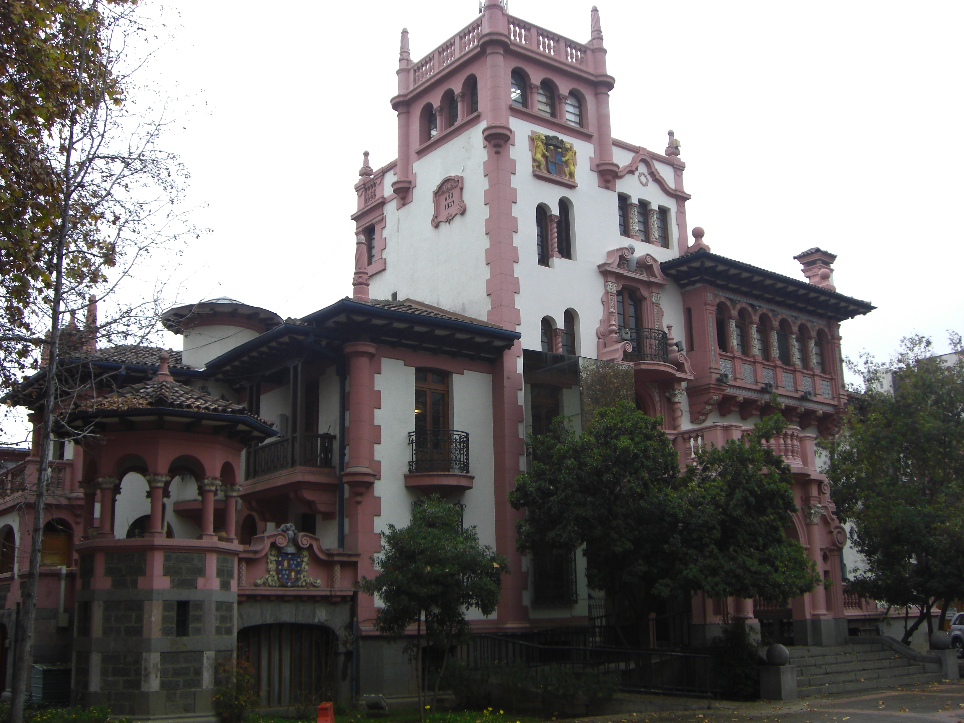 Fachada Sur-poniente del Palacio Vásquez, I. Municipalidad de Macul.